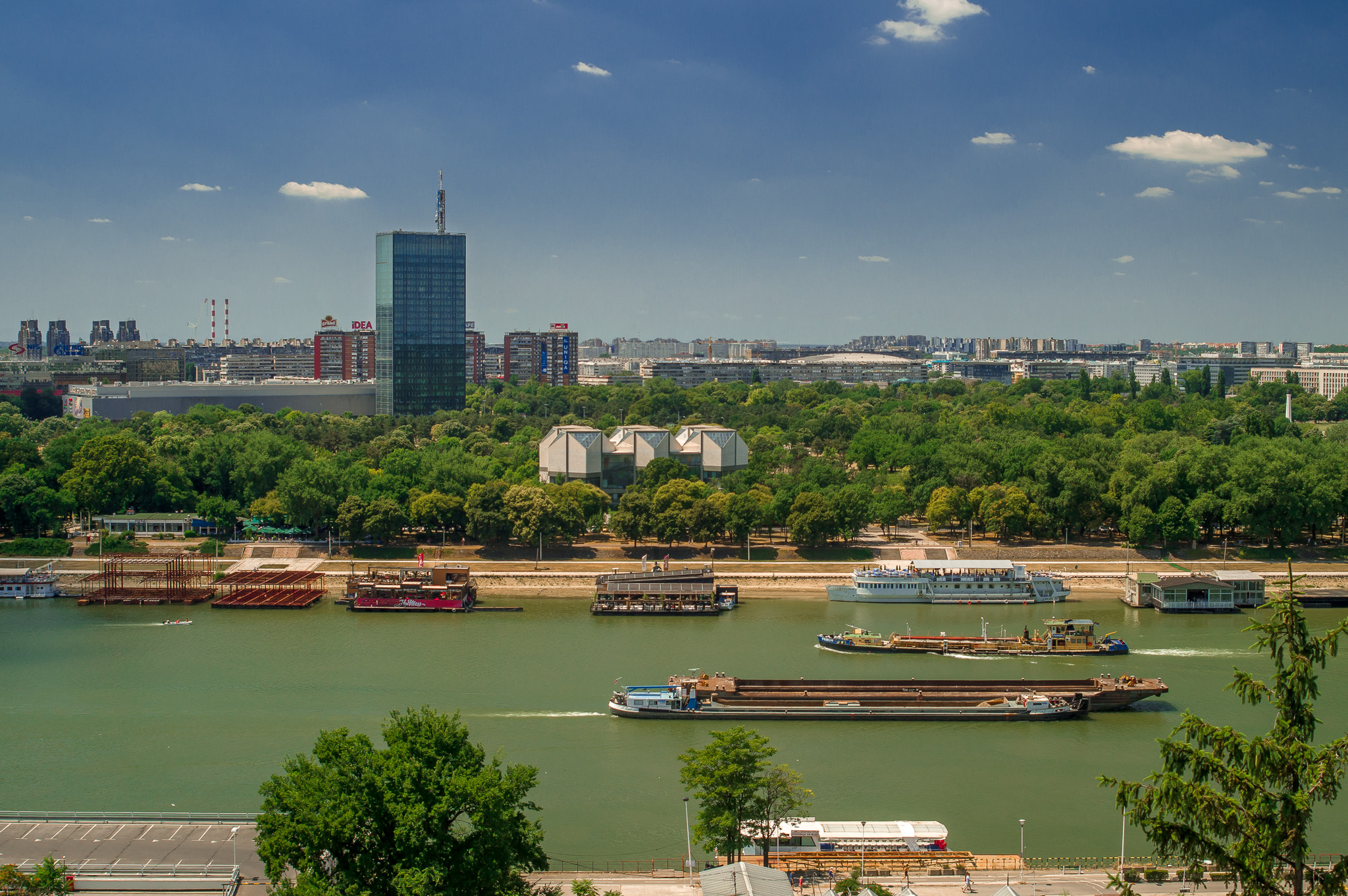 Pogled na TC Usce sa kalemegdana